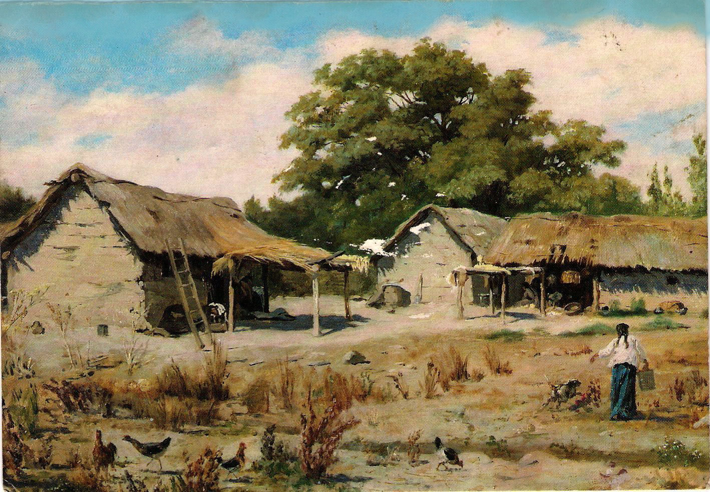 Escena campesina